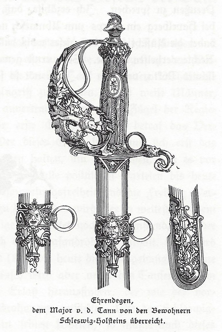 Zeichnung des Ehrendegens, den die Schleswig-Holsteiner dem Major Ludwig von der Tann-Rathsamhausen, dem Führer des schleswig-holsteinischen Freikorps, schenkten.